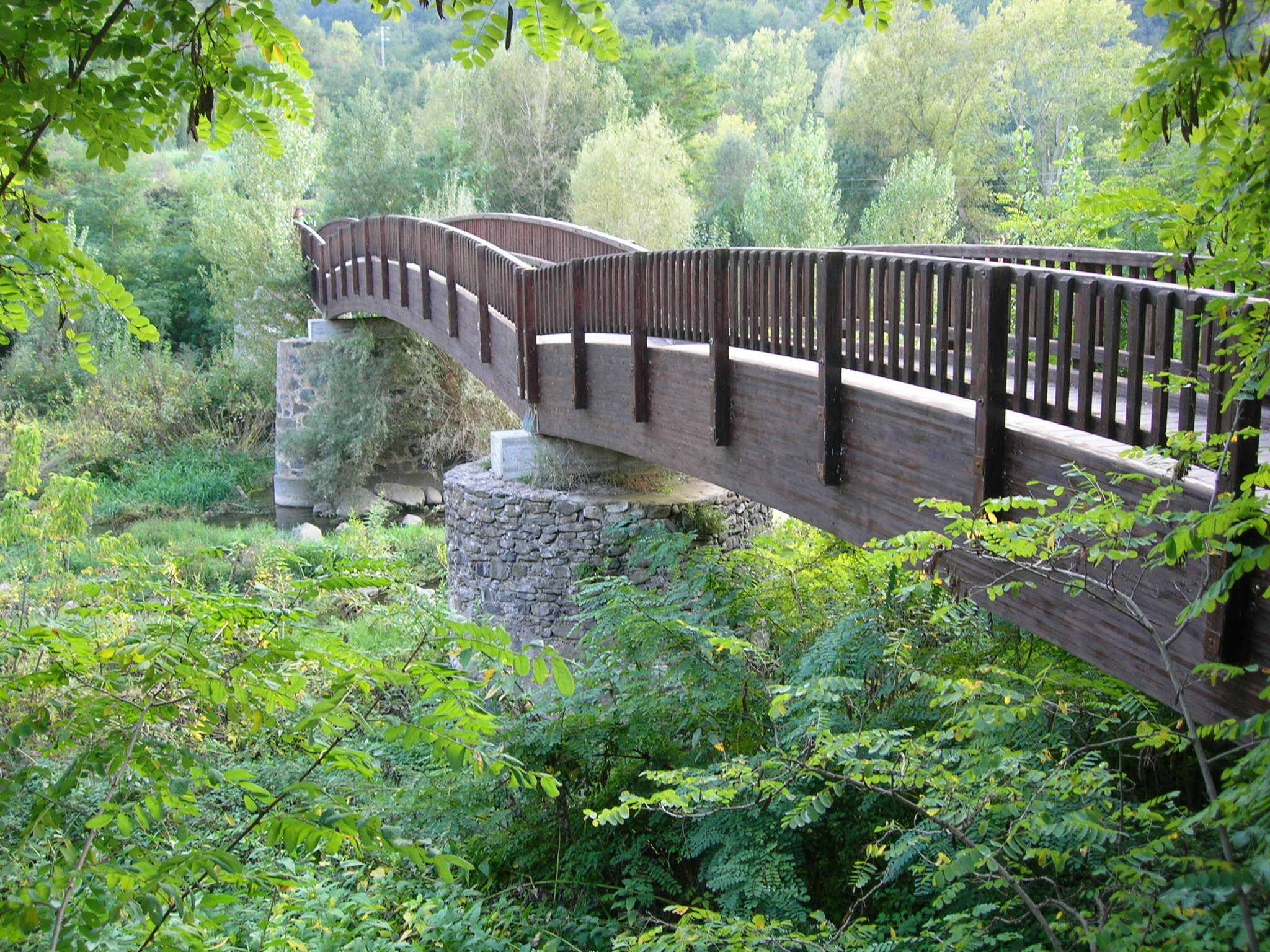 Passarel·la sobre el Fluvià (Castellfollit de la Roca) This is a a photo of a natural area in Catalonia, Spain, with id: ES510218